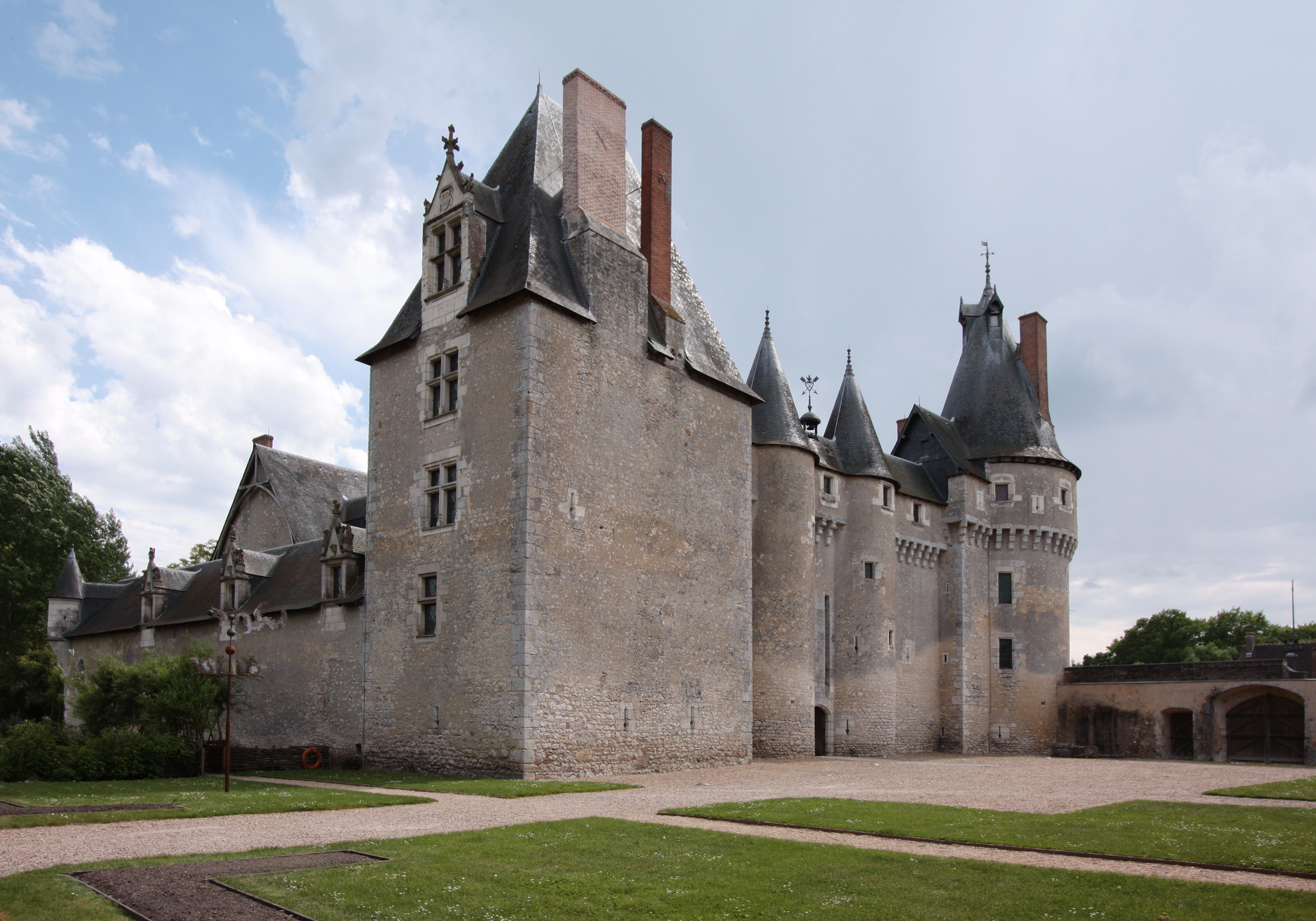 Schloss Fougères-sur-Bièvre in der Ortschaft Fougères-sur-Bièvre im Département Loir-et-Cher/Frankreich